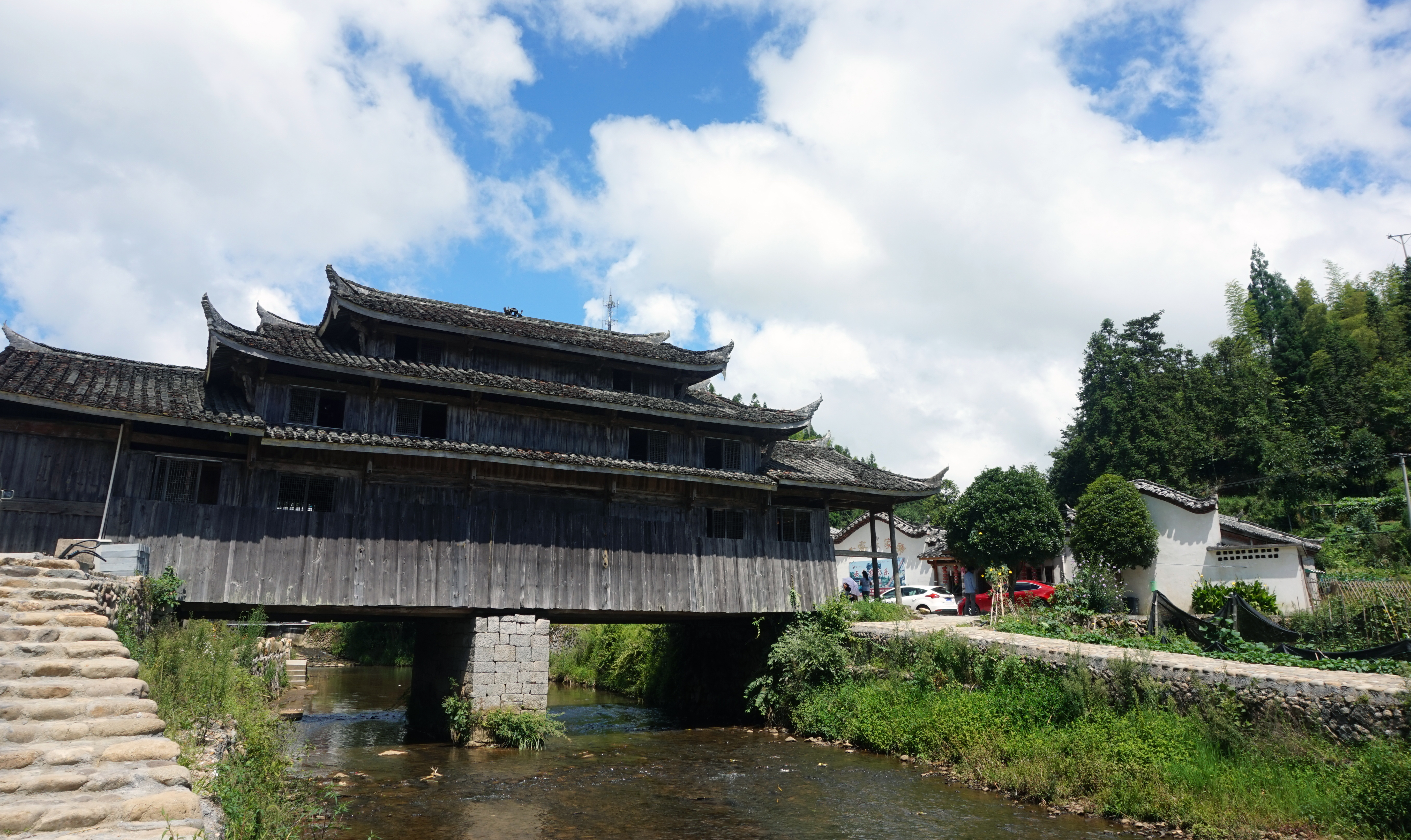 丽水景宁大漈护关桥。